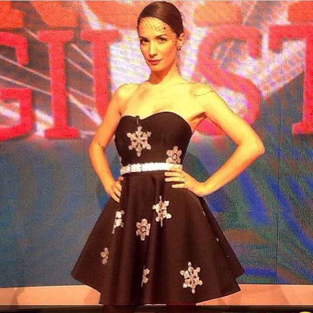 Andrea Delogu nello studio di Troppo giusti